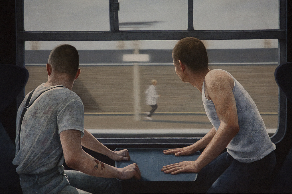 twee skinheads in een trein coupe olieverf op doek